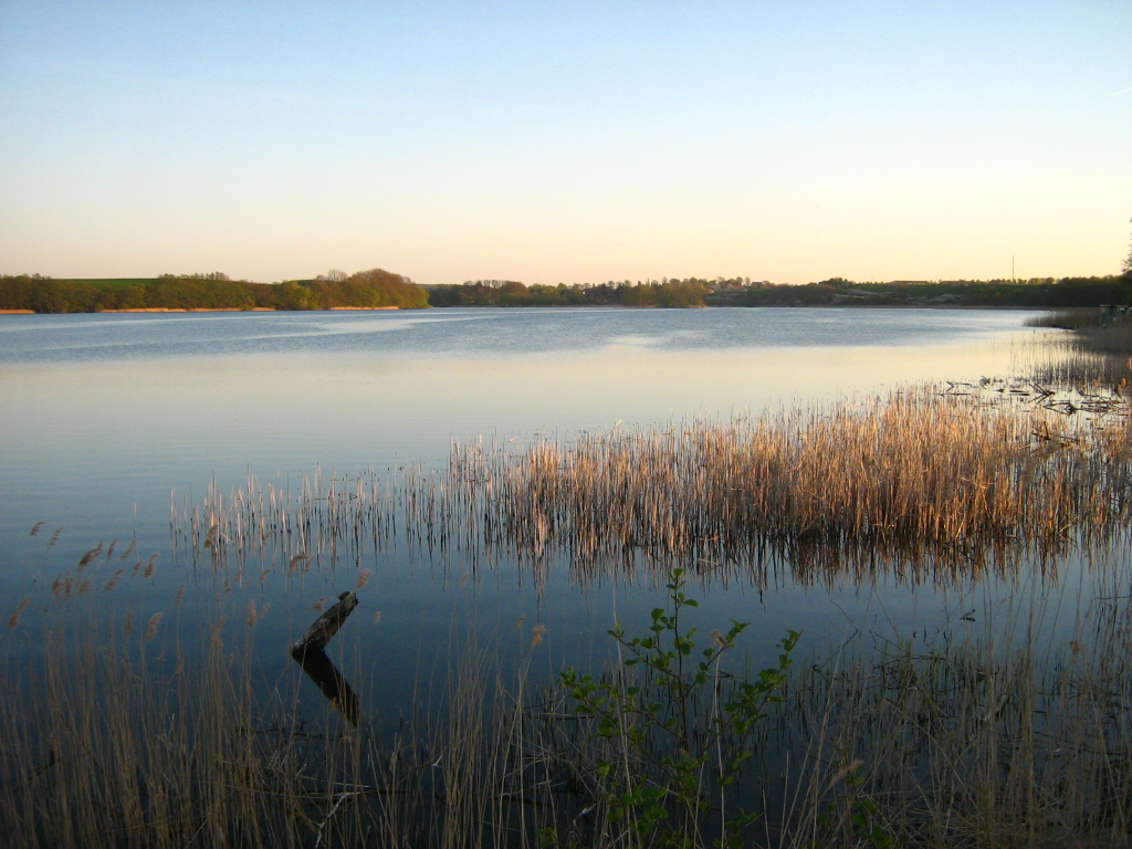 Der Cambser See bei Cambs im Landkreis Parchim (Mecklenburg).